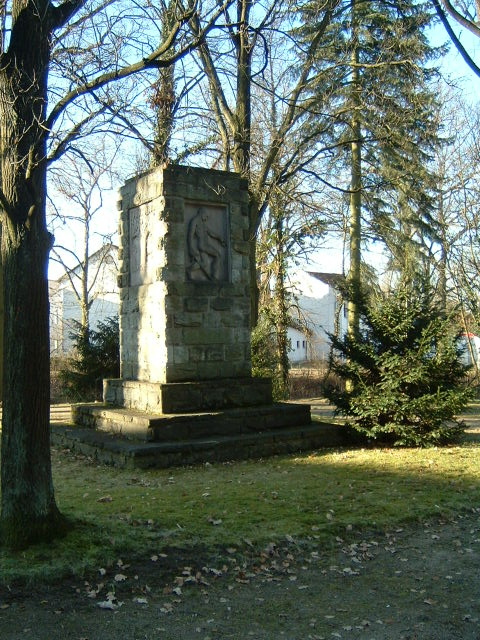 Schwalbach am Taunus, Ehrenmal für die Gefallenen (1. Weltkrieg)